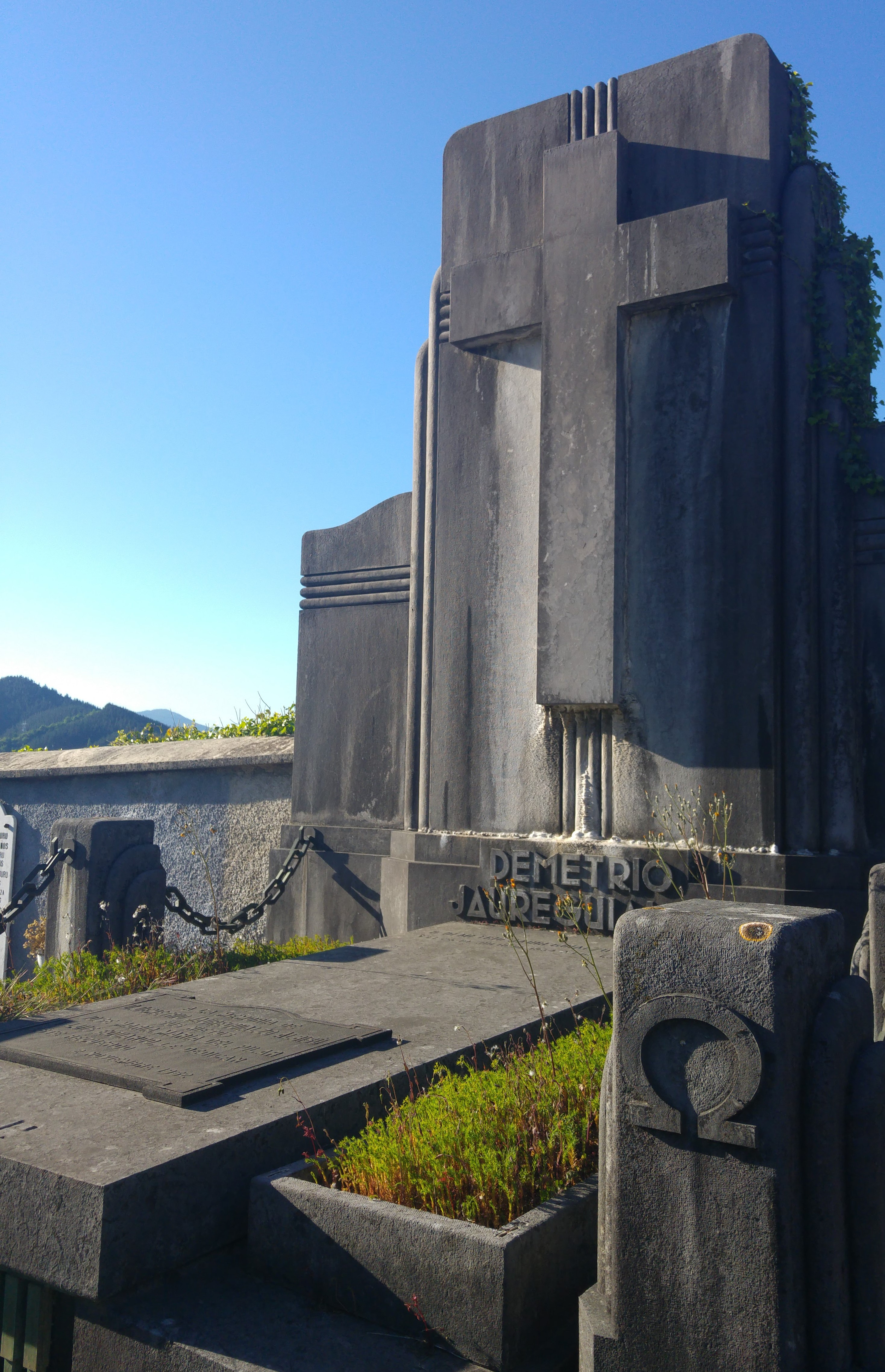 Tumba de Demetrio Jauregialzo en el cementerio de Idiazabal.